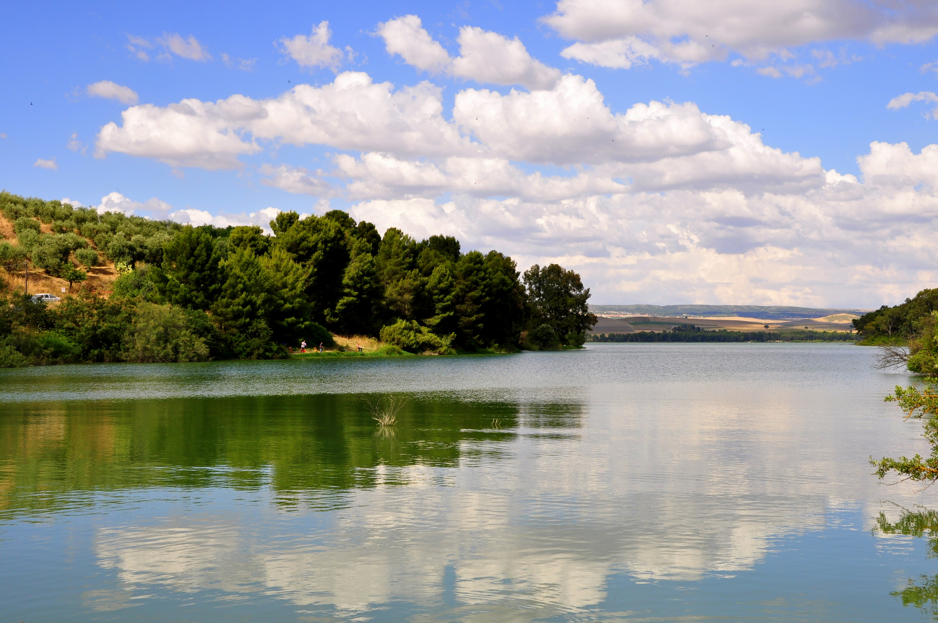 Lago di San Giuliano This is a photo of a monument which is part of cultural heritage of Italy. The authorisation for taking photos of this object was provided by the World Wide Fund for Nature Italy.